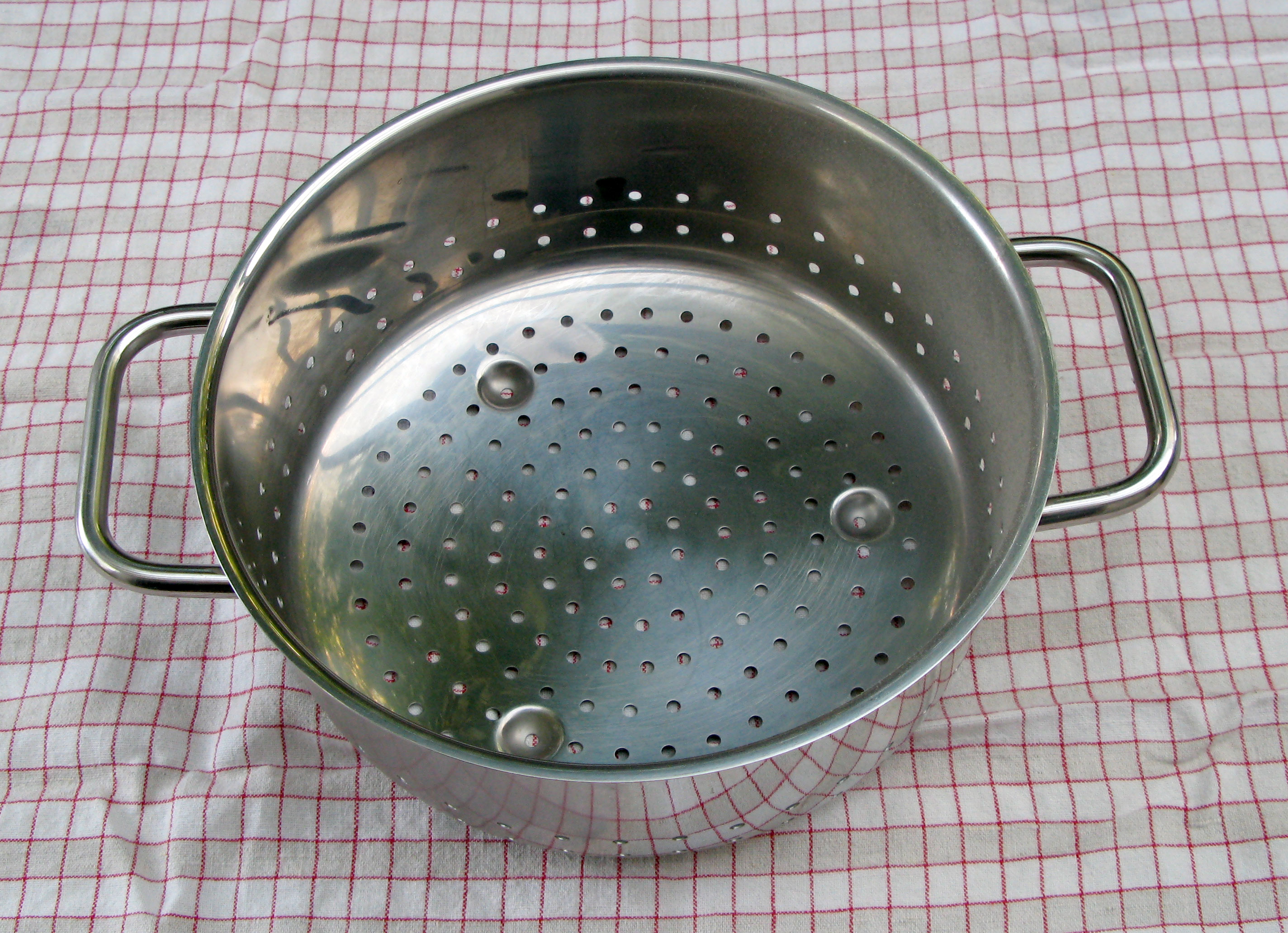 Seibecken.